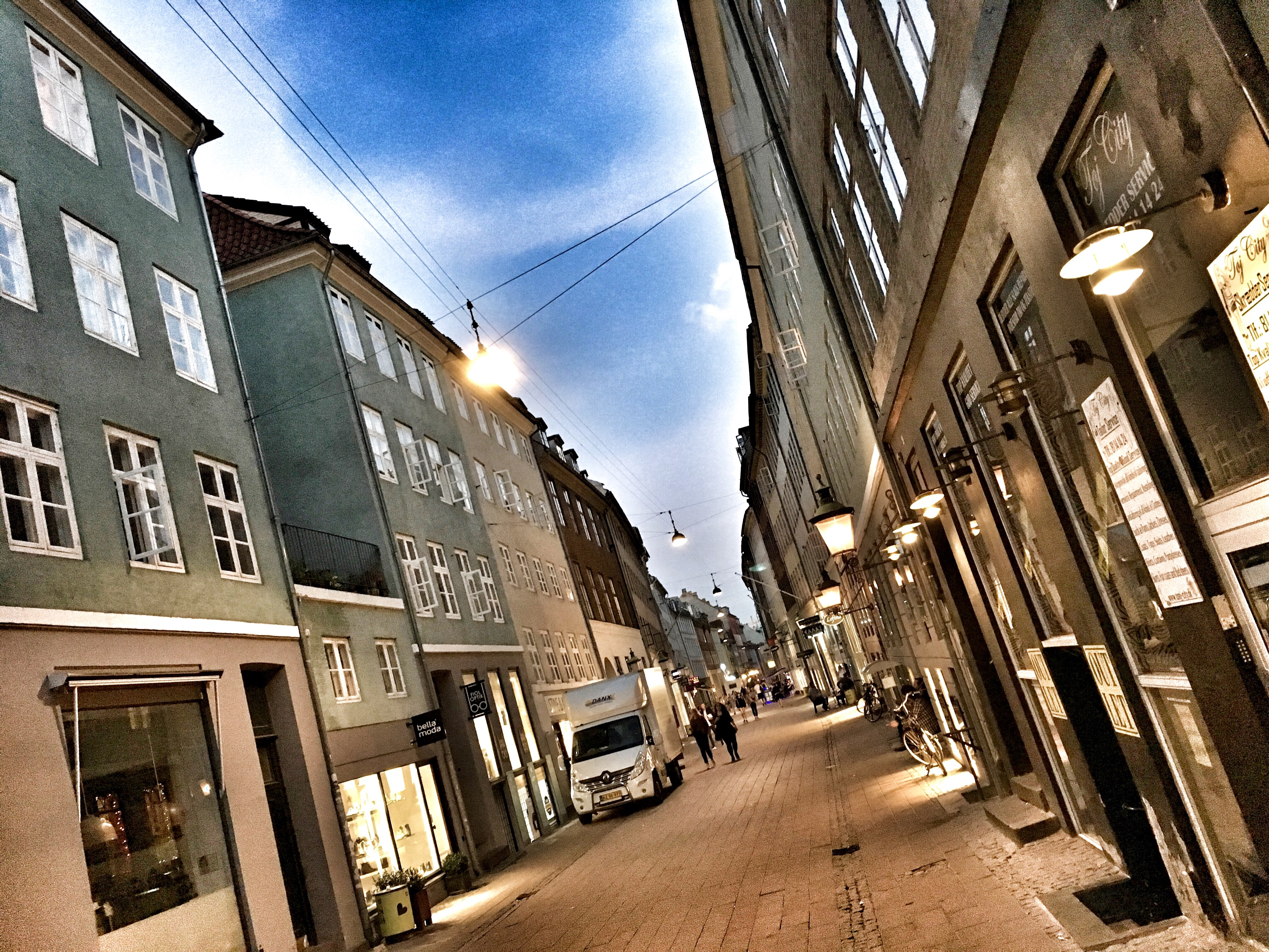 Fiolstræde, København